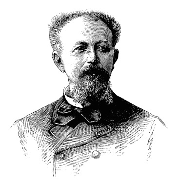 "M. Turquet, député".